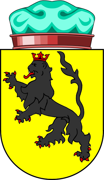 Stema Domnitorului Duce Despot al Marii Valahii în armoarialul lui Ulrich von Richental "Conciliumbuch zu Costancz" (1420-1430), ediția "Codex d‘Aulendorf" (1433-1450), dedicat delegațiilor participante la Conciliul de la Constanța (1414-1418).